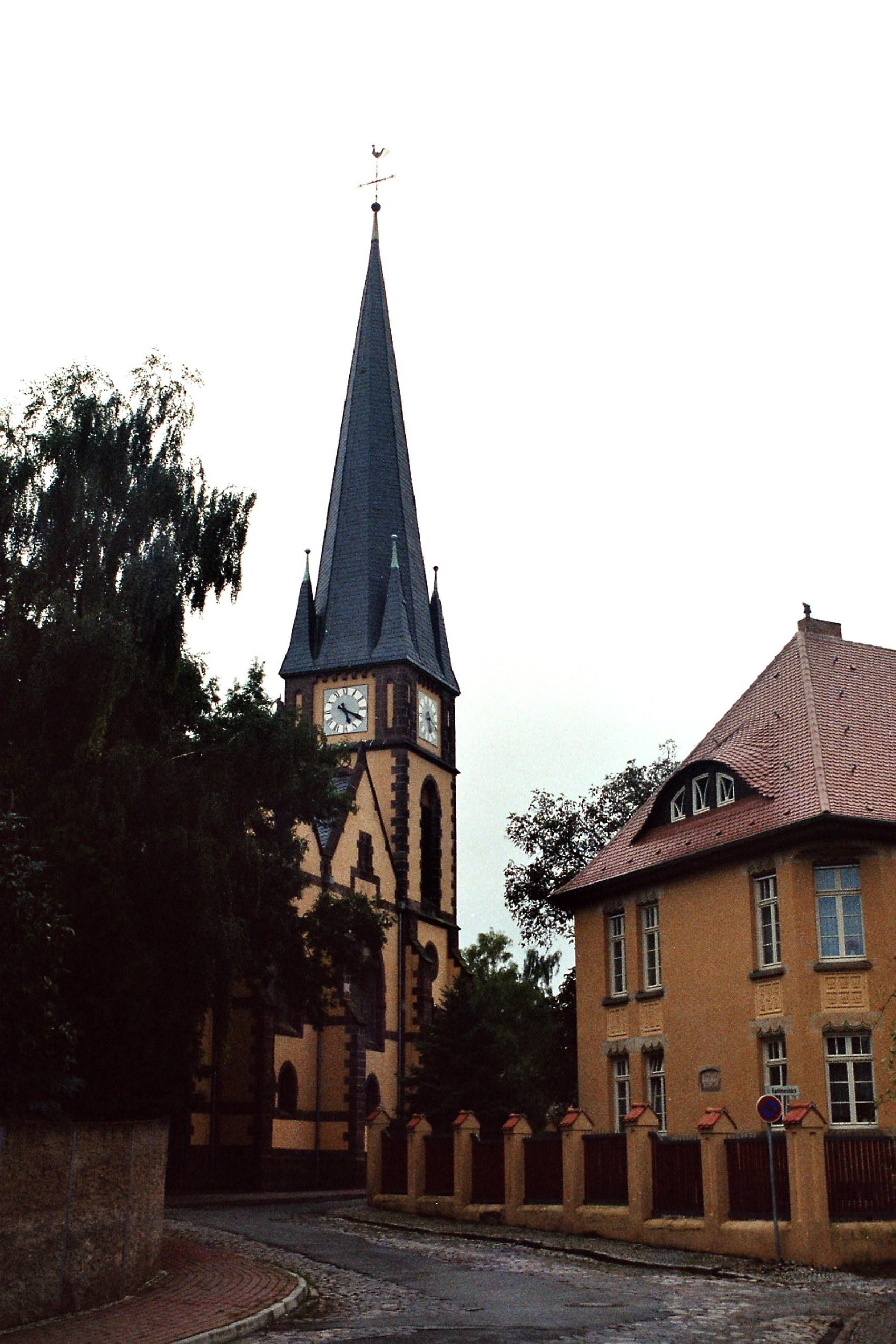 Neundorf (Staßfurt), the church St. Peter and Paul This is a photograph of an architectural monument. 97835